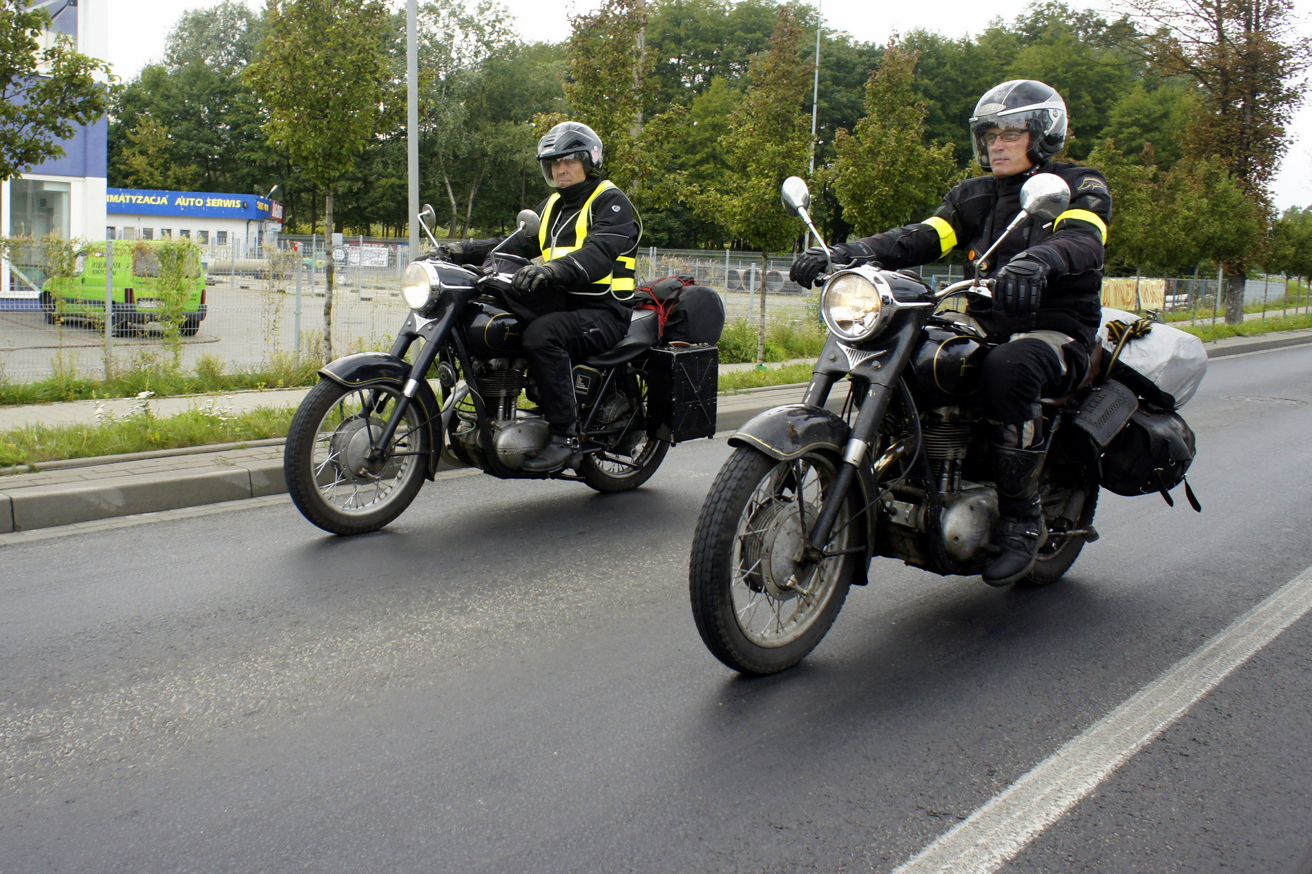 Junaki spotkane w trasie ( Poznań 2013 ) PiotrC i K54 w czasie powrotu ze spotkania Dzikiego Junaka - Wild Junak w Górach Harzu